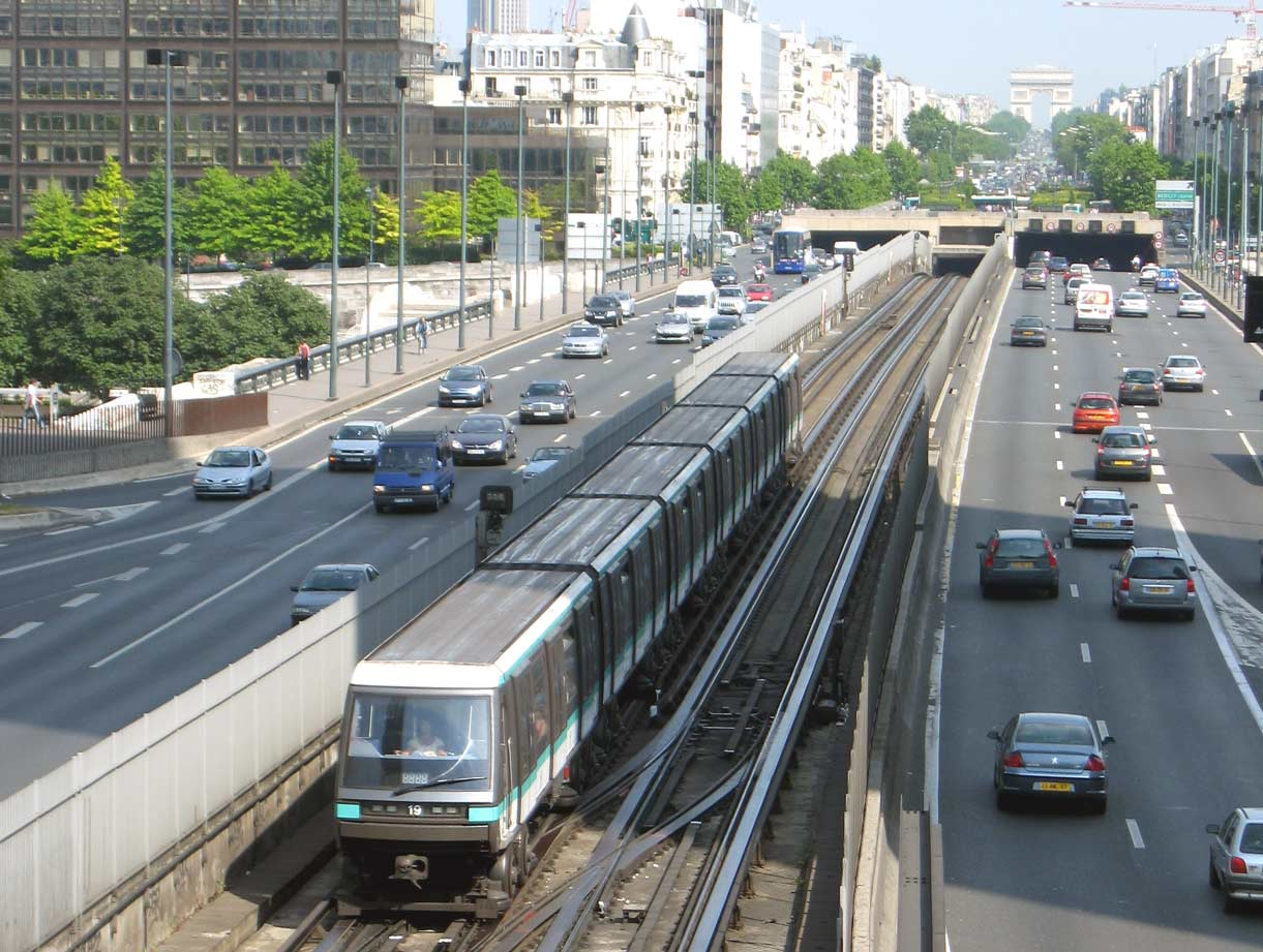 Description : Rame MP89 de la ligne 1 du métro sur le pont de Neuilly Place : Paris, France Date : juin 2006 Author : Pline photo personnelle